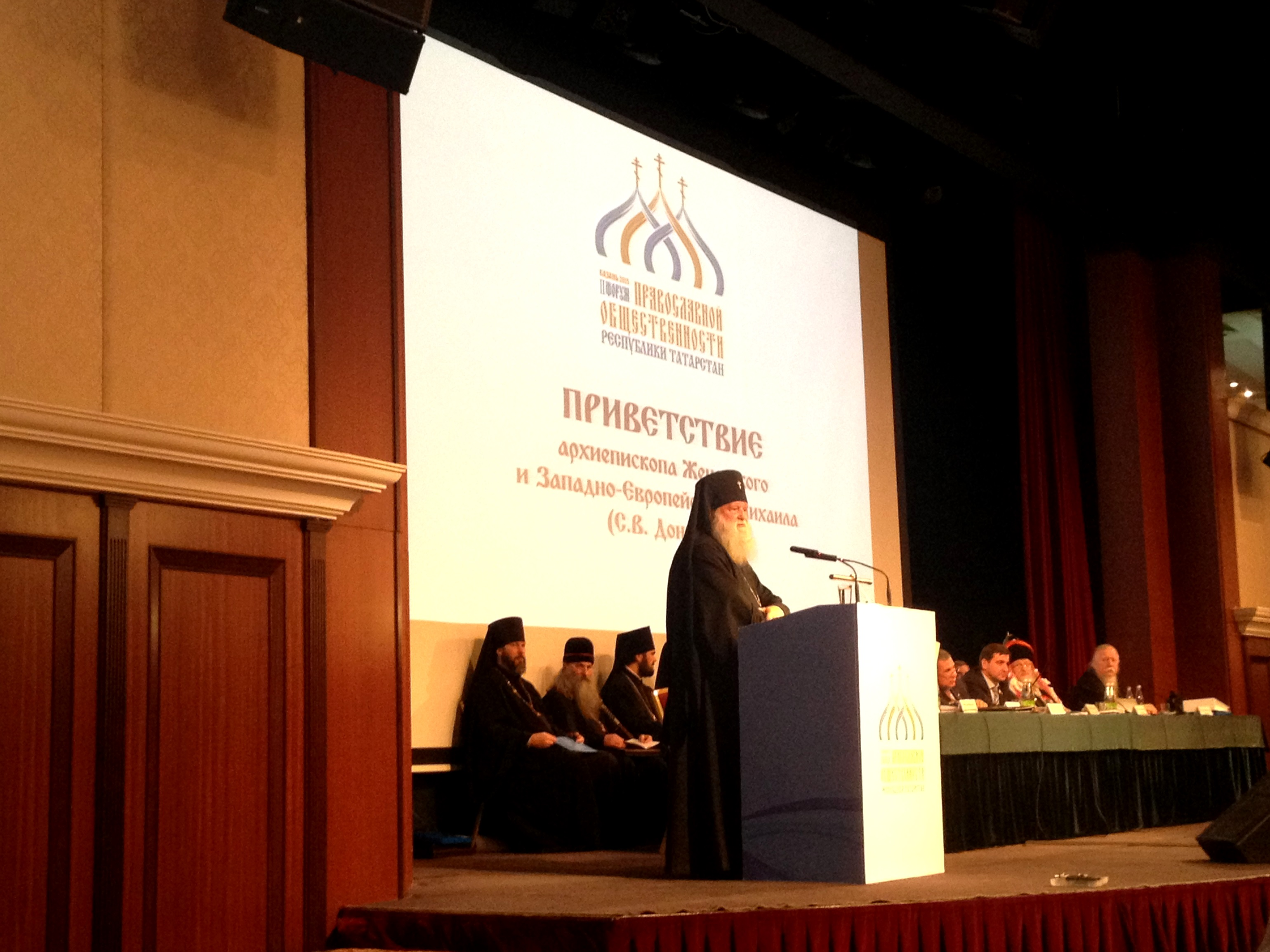 Выступление архиепископа Женевского и Западно-Европейского РПЦЗ Михаила (С.В.Донскова) на II Форуме православной общественности Республики Татарстан (г. Казань, ГТРК "Корстон", 26 ноября 2015 г.)